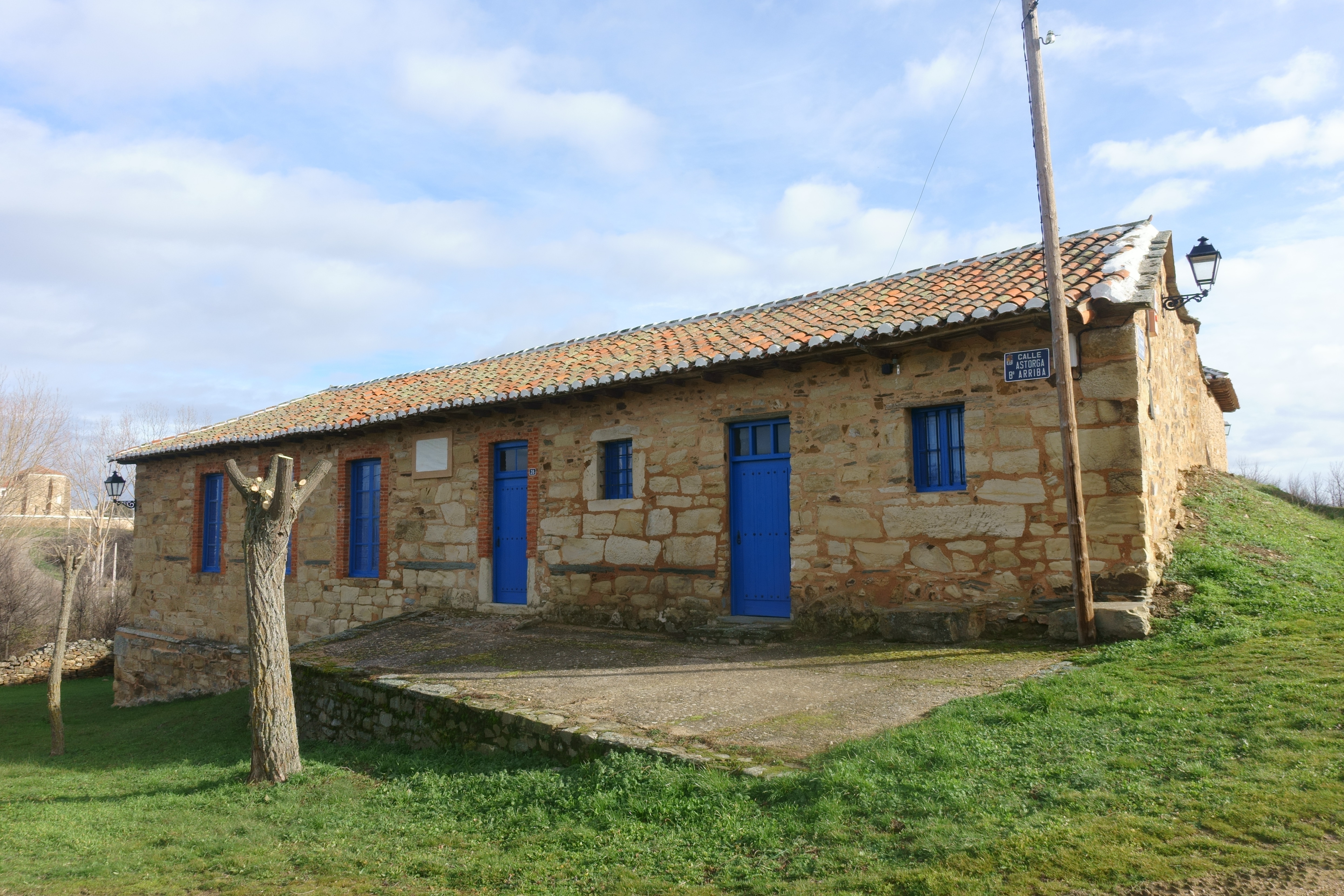 Museo de la Arriería Ventura Alonso, en el barrio de Arriba de Santiago Millas (León, España).